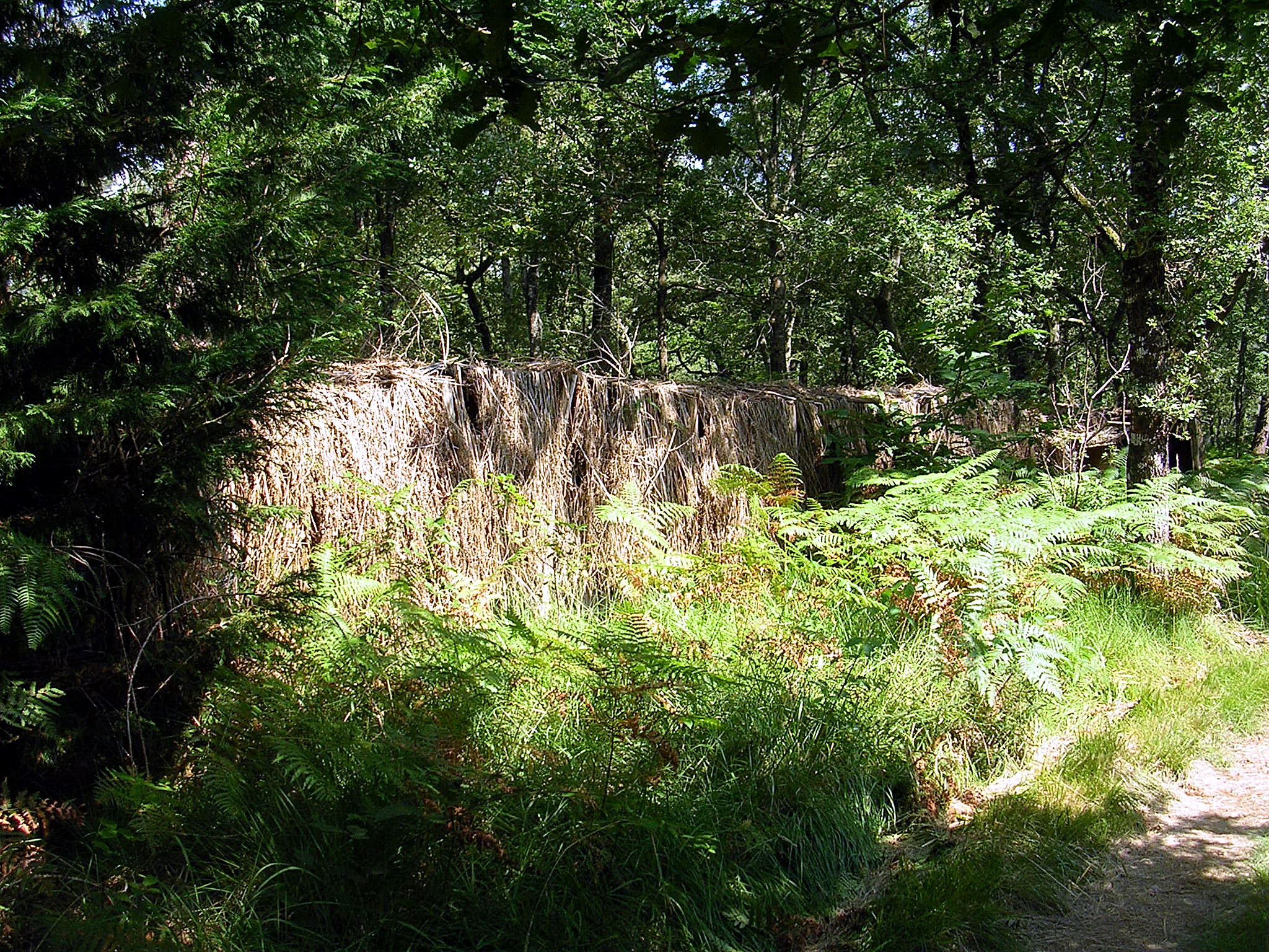 Galerie de palombière vue de l'extérieur (forêt des Landes, en France). Cette palombière et la forêt ont été entièrement détruites au passage de la tempête Klaus le 24 janvier 2009.